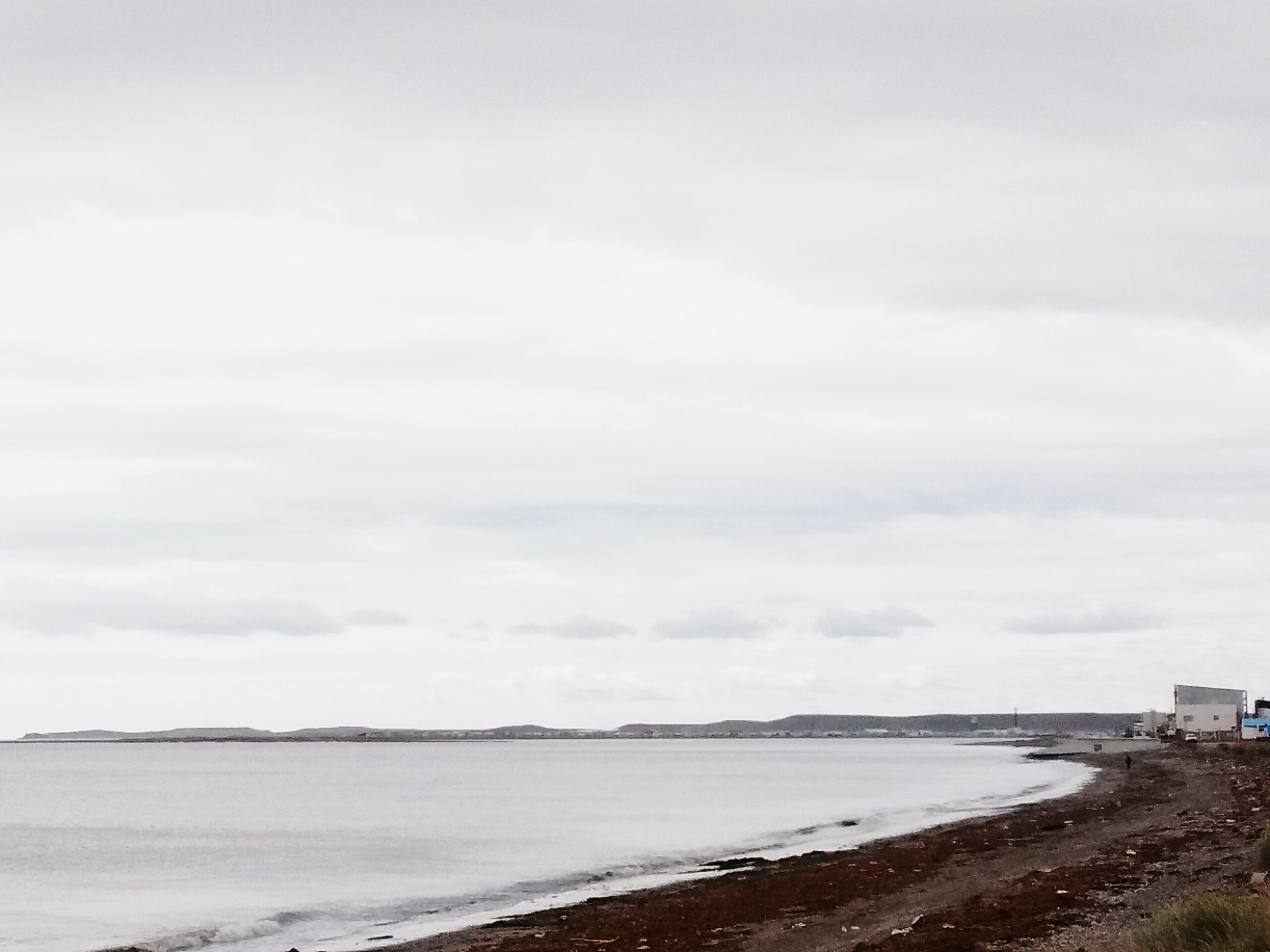 El cabo sin punta Popper de por medio desde Río Grande